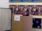 ביבי נתניהו מצביע בריימריס של הליכוד